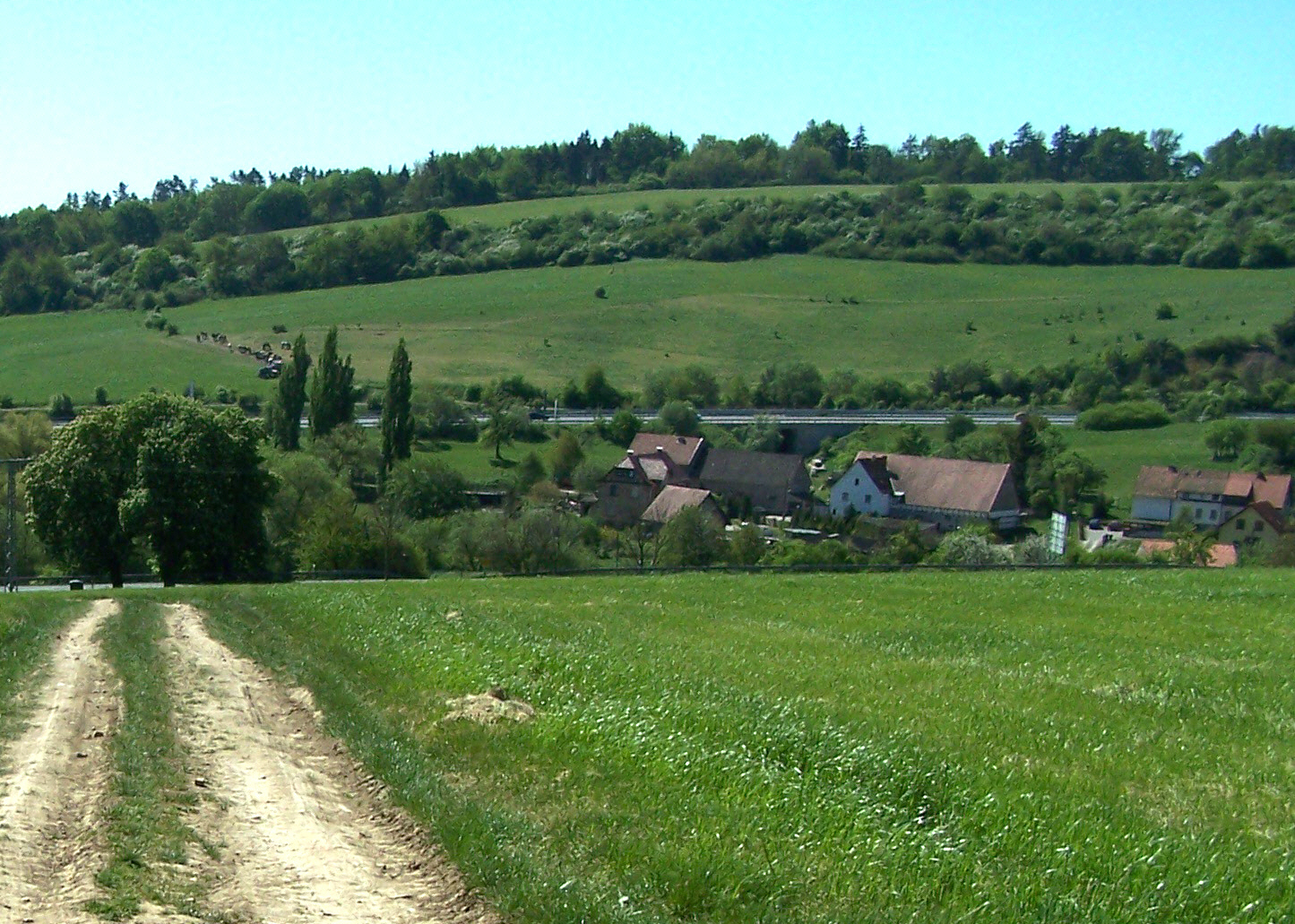 Der Eisenacher Stadtteil Ramsborn mit der Karlskuppe von Norden gesehen.